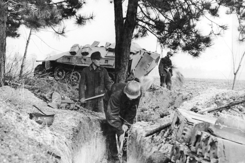 RAD-Flak, Ausheben eines Schützengrabens Die erste Arbeit nach dem Stellungswechsel - Eingraben, immer nur eingraben. Die Sowjets sind auf der Wacht, Scharfschützen eine ständige Gefahr für die jungen Männer der RAD-Flakbatterie sich ebenfalls so unsichtbar wie möglich zu machen. [Frühjahr 1945] Prop.-Kp. RAD, Film-Nr. 25693 Bildberichter: Wöhr, Text: Berendt [Im Hintergrund mittlerer Schützenpanzer (Sd.Kfz. 251)]